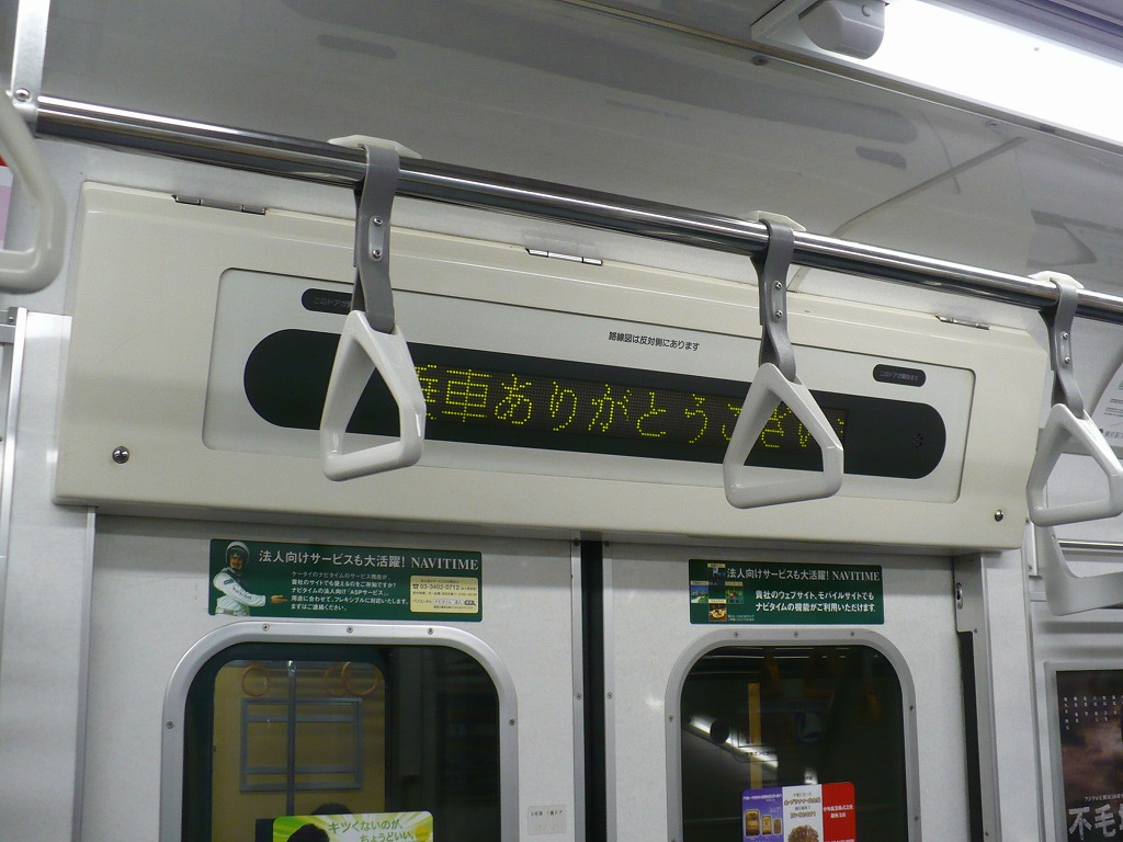 都営5300形車内